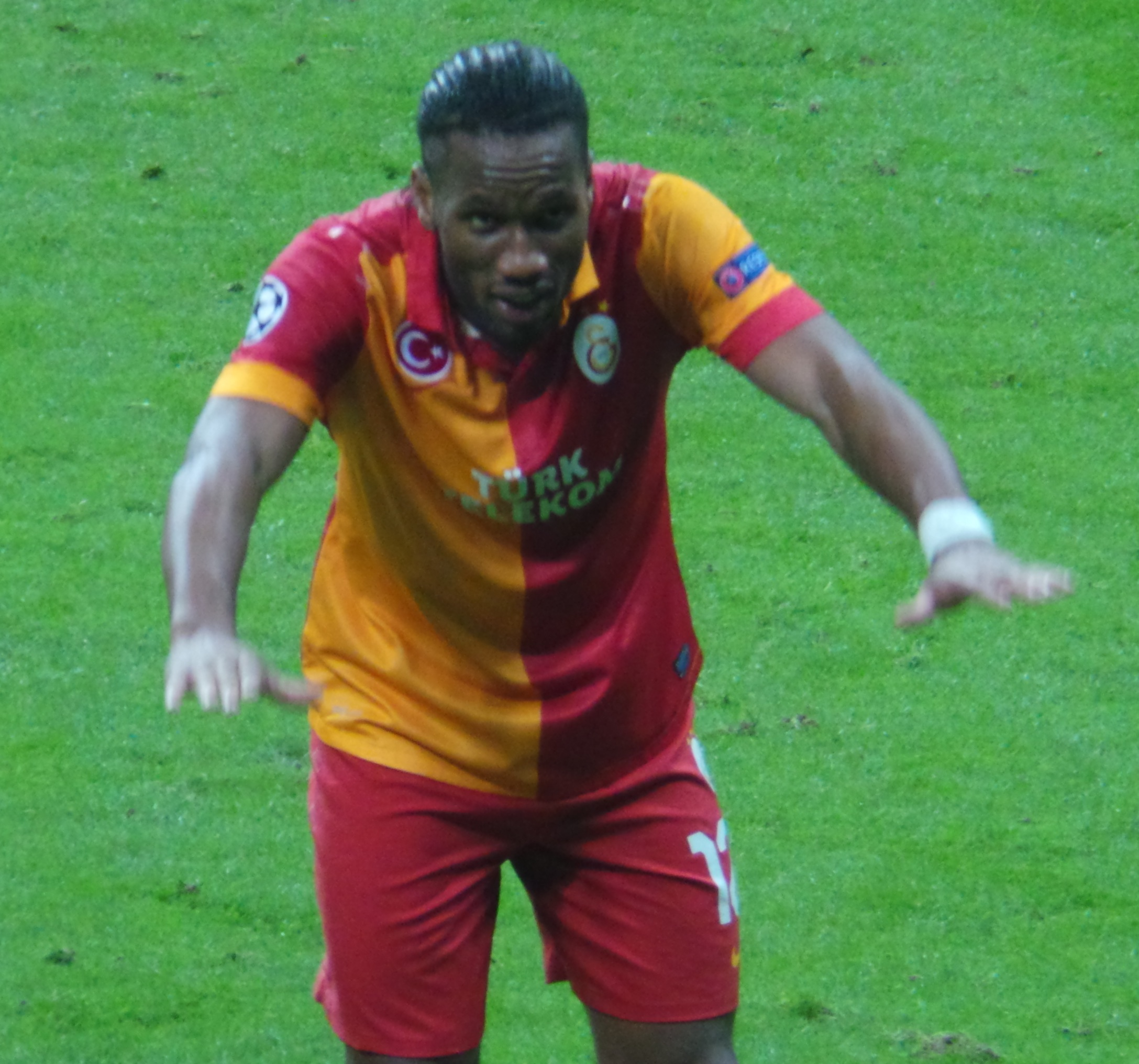 Drogba hayranlara selam verirken